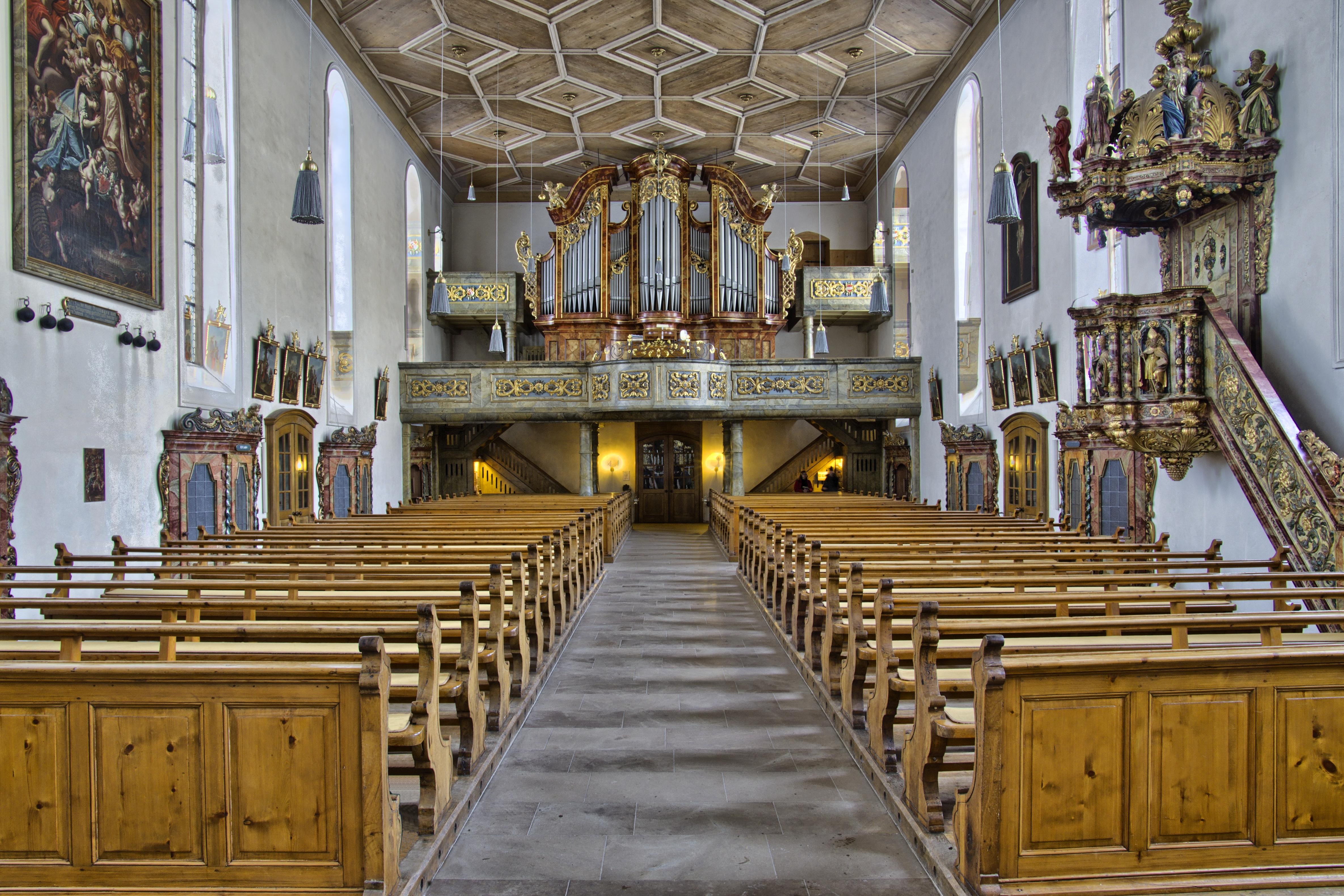 Bilder der Wallfahrtskirche "Maria in der Tanne" in Triberg Schwarzwald